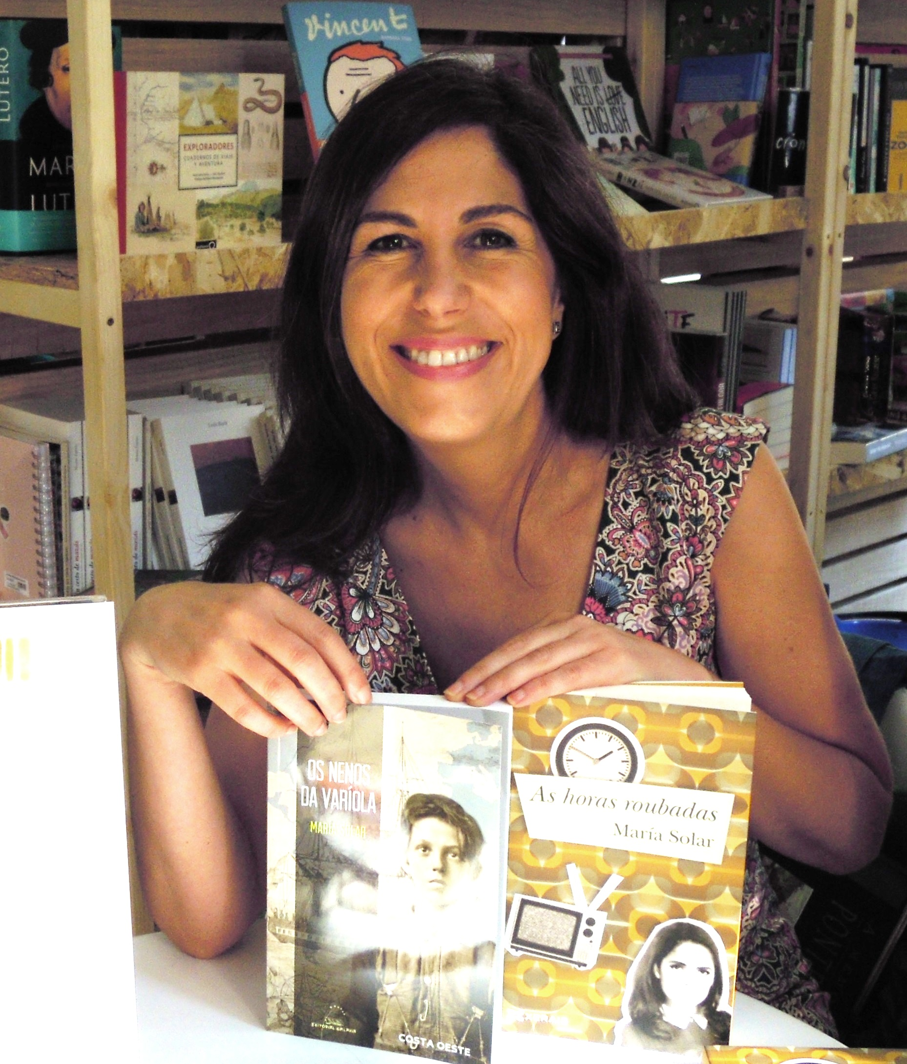 María Solar na Festa dos Libros de Pontevedra